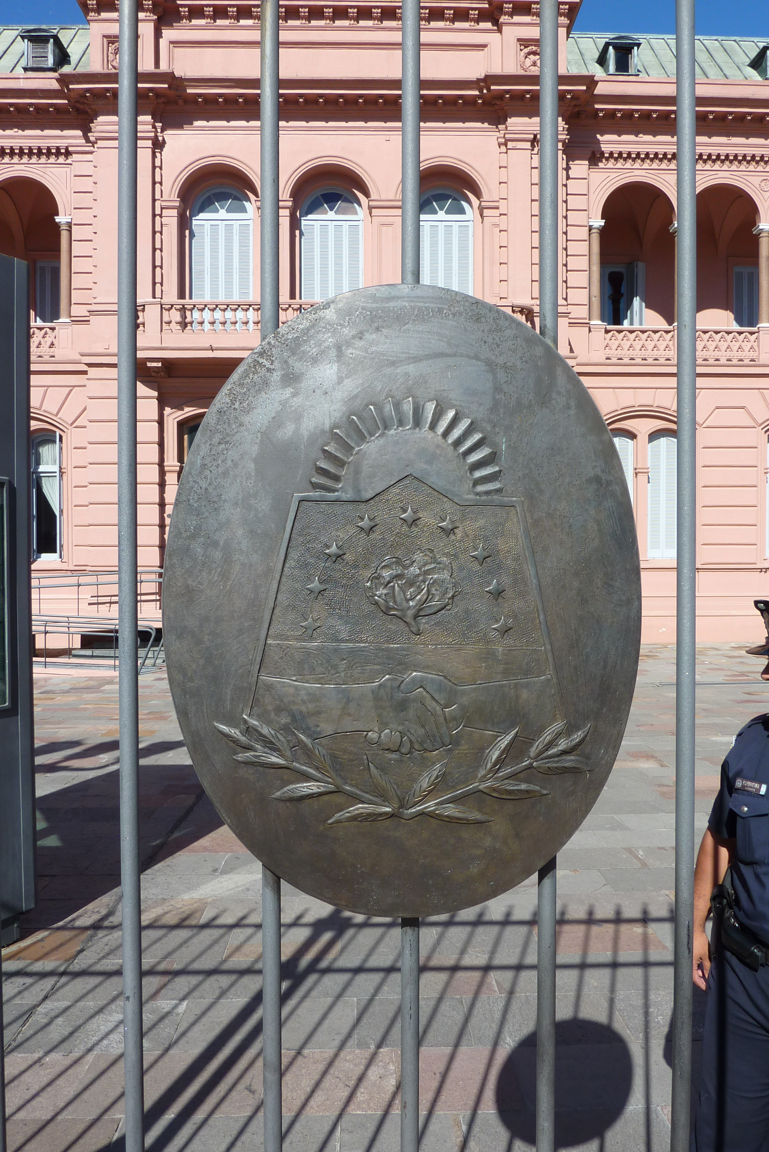 Casa Rosada (Buenos Aires), emblem at fence